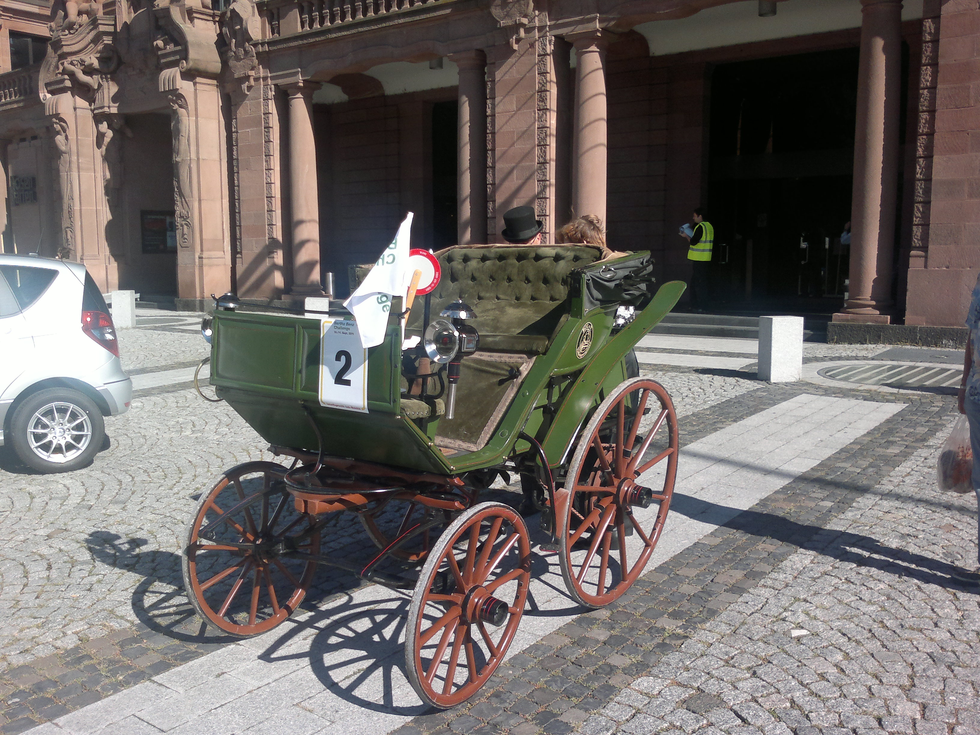 Flocken Baujahr 1888, Andreas Flocken Coburg, eines der ältesten Elektrofahrzeuge Deutschlands oder der Welt. Inh. Franz Haag, Mitglied RCC e.V.